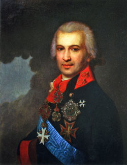 Piotr Obolianinov